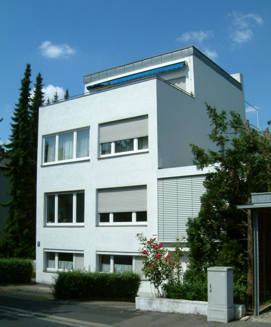 Arch. Peter Feile, Würzburg, Lerchenhain 5